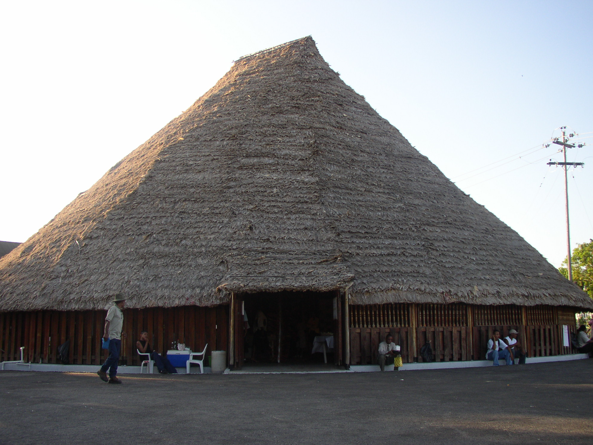 Umana Yana, Georgetown, Guyana Umana_Yana_by_Khirsah1.jpg